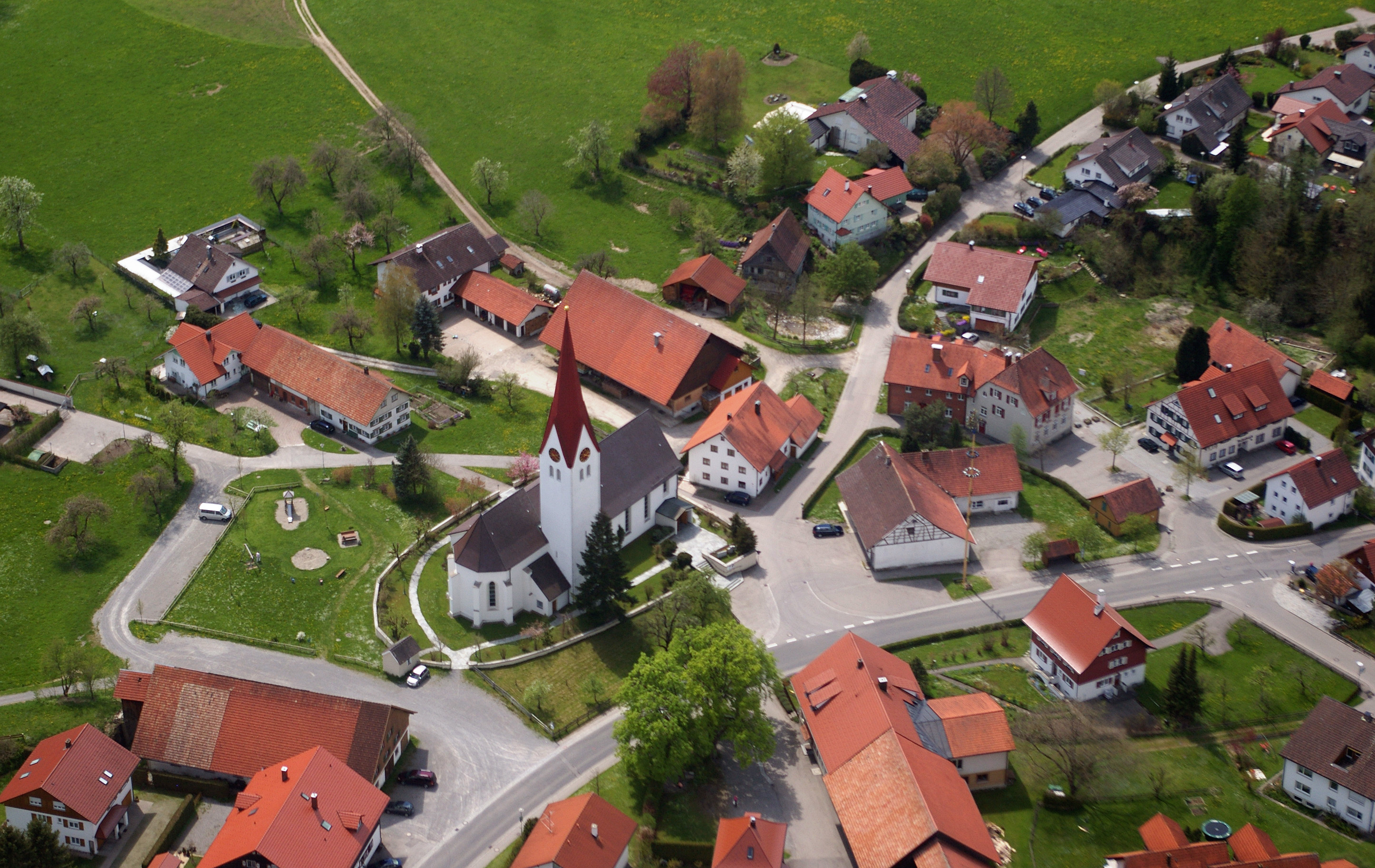 Luftaufnahme der Kirche in Deuchelried (Allgäu)